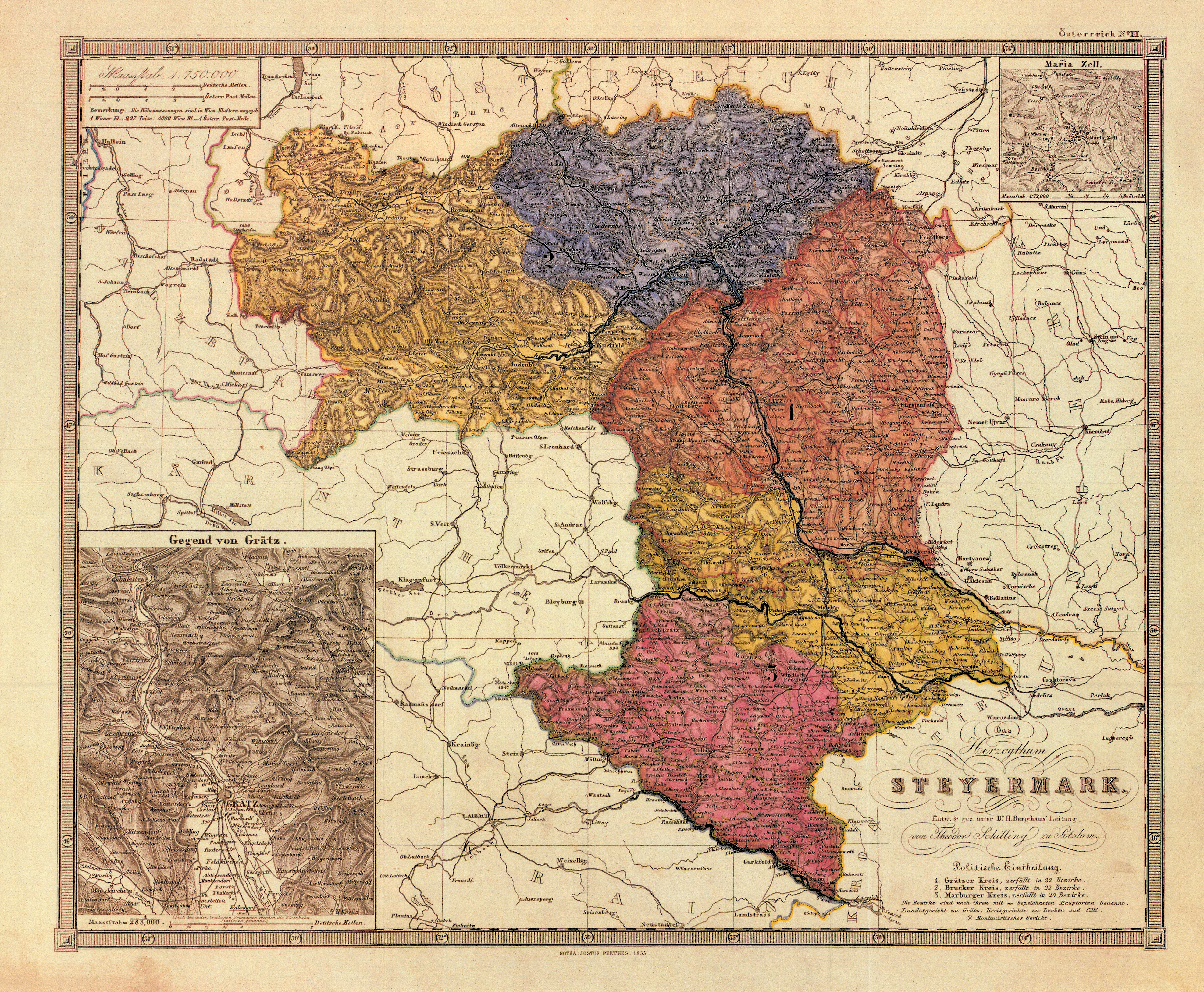 historische Landkarte: Das Herzogthum Steyermark. Entworfen und gezeichnet unter Dr. H. Berghaus' Leitung von Theodor Schilling zu Potsdam. Gotha. Justus Perthes 1855. Die Karte bezeichnet zwar farbig die fünf Kreise der Steiermark (Judenburger, Brucker, Grazer, Marburger und Cillier Kreis), führt aber (rechts unten) nur die drei Kreise der Kreisregierungen ab 1848 an: Die Zuständigkeitsbereiche dieser Verwaltungsbehörden umfassten (2) den Brucker und Judenburger Kreis, den (1) Grazer und nördlichen Teil des Marburger Kreises und (3) den südlichen Teil des Marburger Kreises und den Kreis Cilli (vgl. die Platzierung der jeweiligen Zahl, die sich nicht auf die farbige Auszeichnung, sondern auf die Zuständigkeitsbereiche bezieht). Auf diese Einteilung sind auch die Gerichtssprengel (Landesgericht Graz, Kreisgerichte Leoben und Cilli) zurückzuführen. Quelle: Walter Brunner: Landkarte des Herzogtums Steiermark mit den fünf Kreisen. Original im Steiermärkischen Landesarchiv. In: Helfried Valentinitsch [Hrsg.]: Steiermark Edition, Teil Grenzmark - Herzogtum - Bundesland. Blatt STE 01007. Archiv Verlag. Wien 1990 ff.